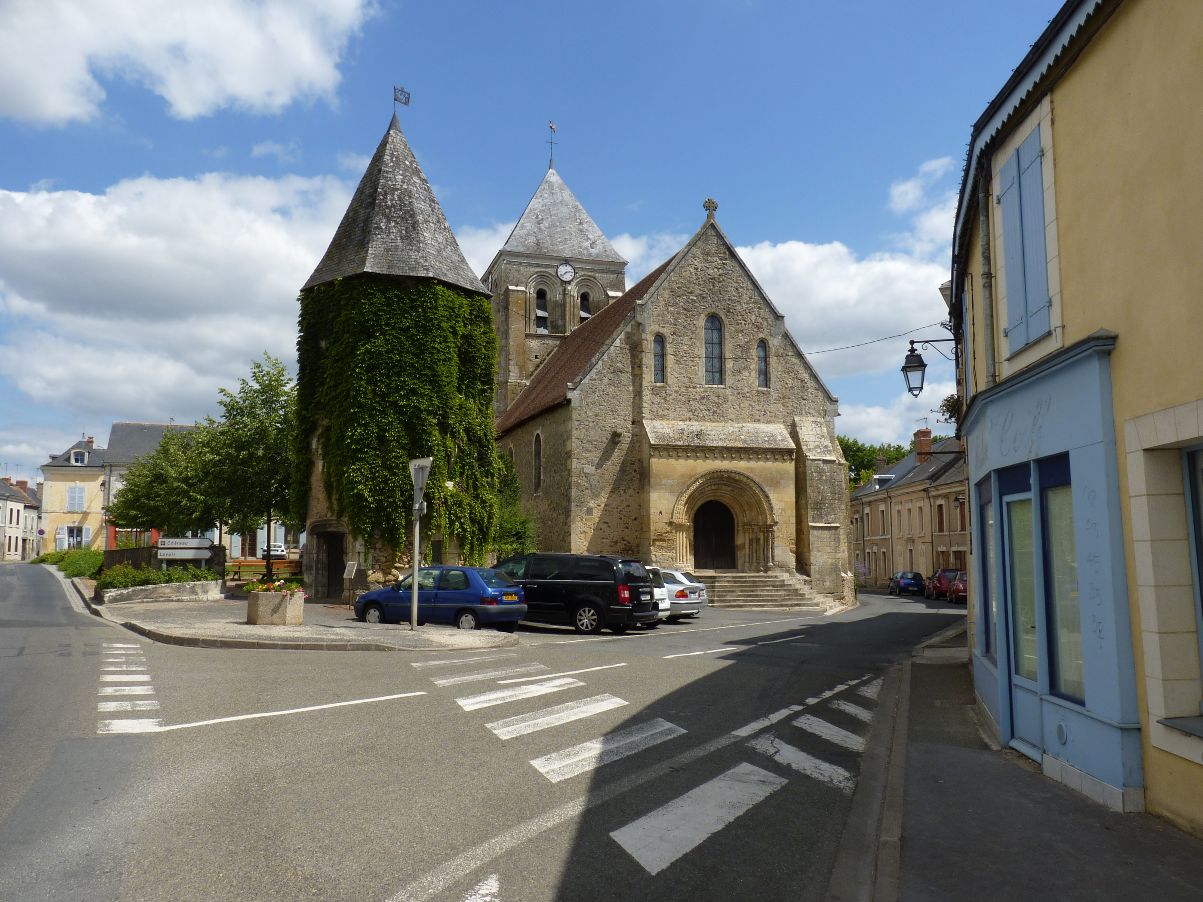 Sarthe - Bazouges-sur-le-Loir - Eglise Saint Aubin